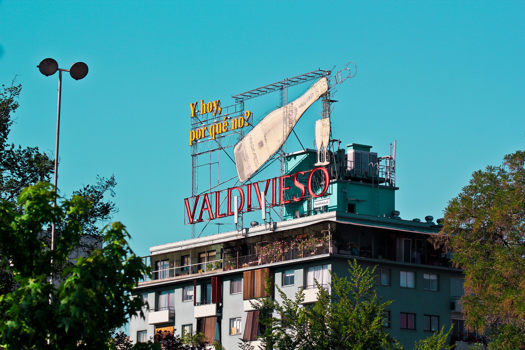 Letrero publicitario de “Valdivieso” This is a photo of a national monument in Chile: 2169